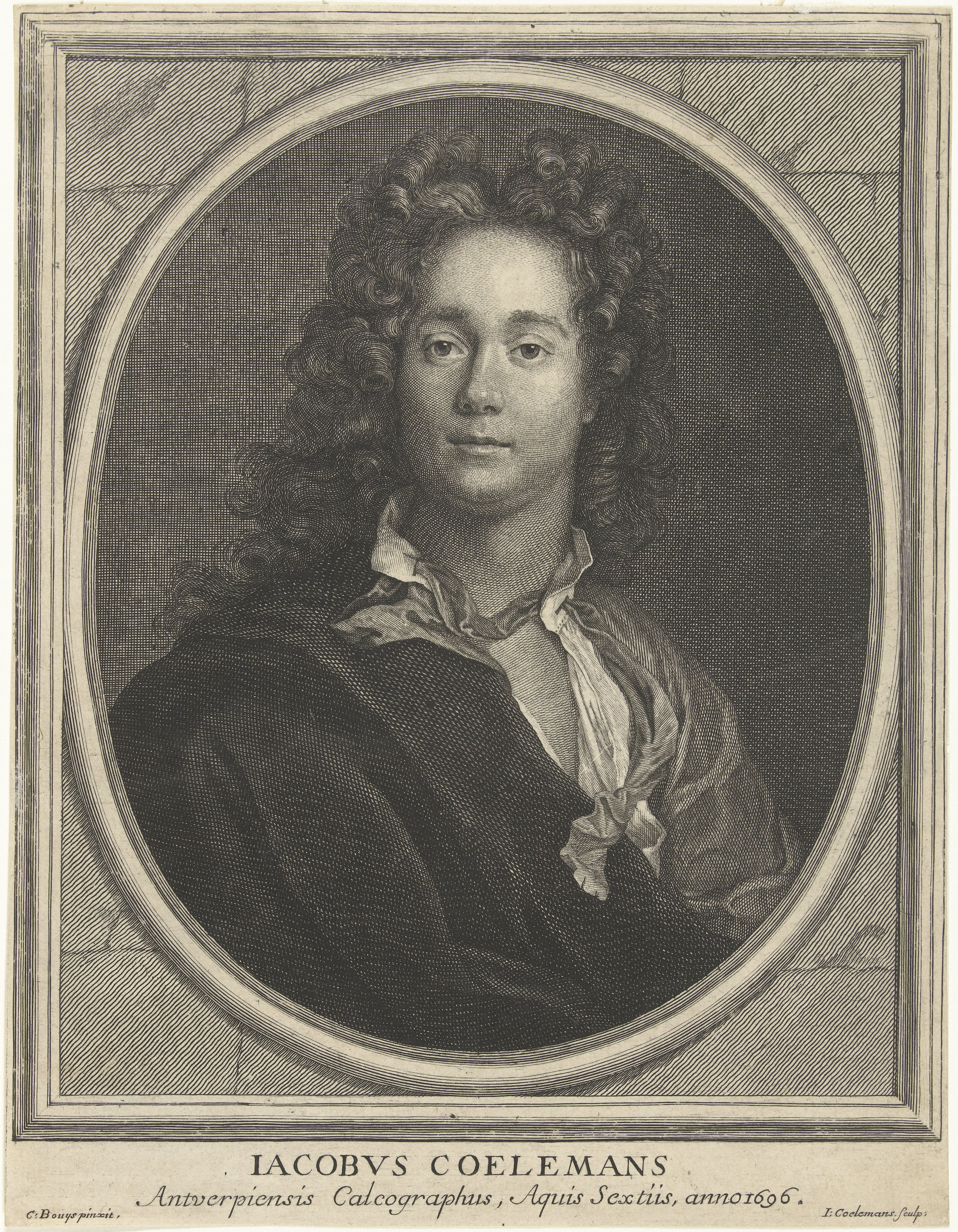 IdentificatieTitel(s): Portret van Jacob CoelemansObjecttype: prent Objectnummer: RP-P-1940-615Opschriften / Merken: verzamelaarsmerk, verso, gestempeld: Lugt 2228verzamelaarsmerk, verso, gestempeld: Lugt 2760Omschrijving: Borstbeeld van de kunstenaar in ovaal met onderschrift.VervaardigingVervaardiger: prentmaker: Jacob Coelemans (vermeld op object)naar schilderij van: Claude Bouys (vermeld op object)Plaats vervaardiging: Antwerpen (mogelijk)Datering: ca. 1696Fysieke kenmerken: gravureMateriaal: papier Techniek: graveren (drukprocedé)Afmetingen: blad: h 243 mm × b 188 mmToelichtingBehoort tot de Verzameling Gerritsen, kunstenaarsportrettenOnderwerpWat: engraver, etcher (+ portrait, self-portrait of artist)Wie: Jacob CoelemansVerwerving en rechtenCredit line: Aankoop uit het F.G. Waller-FondsVerwerving: aankoop 1940Copyright: Publiek domein